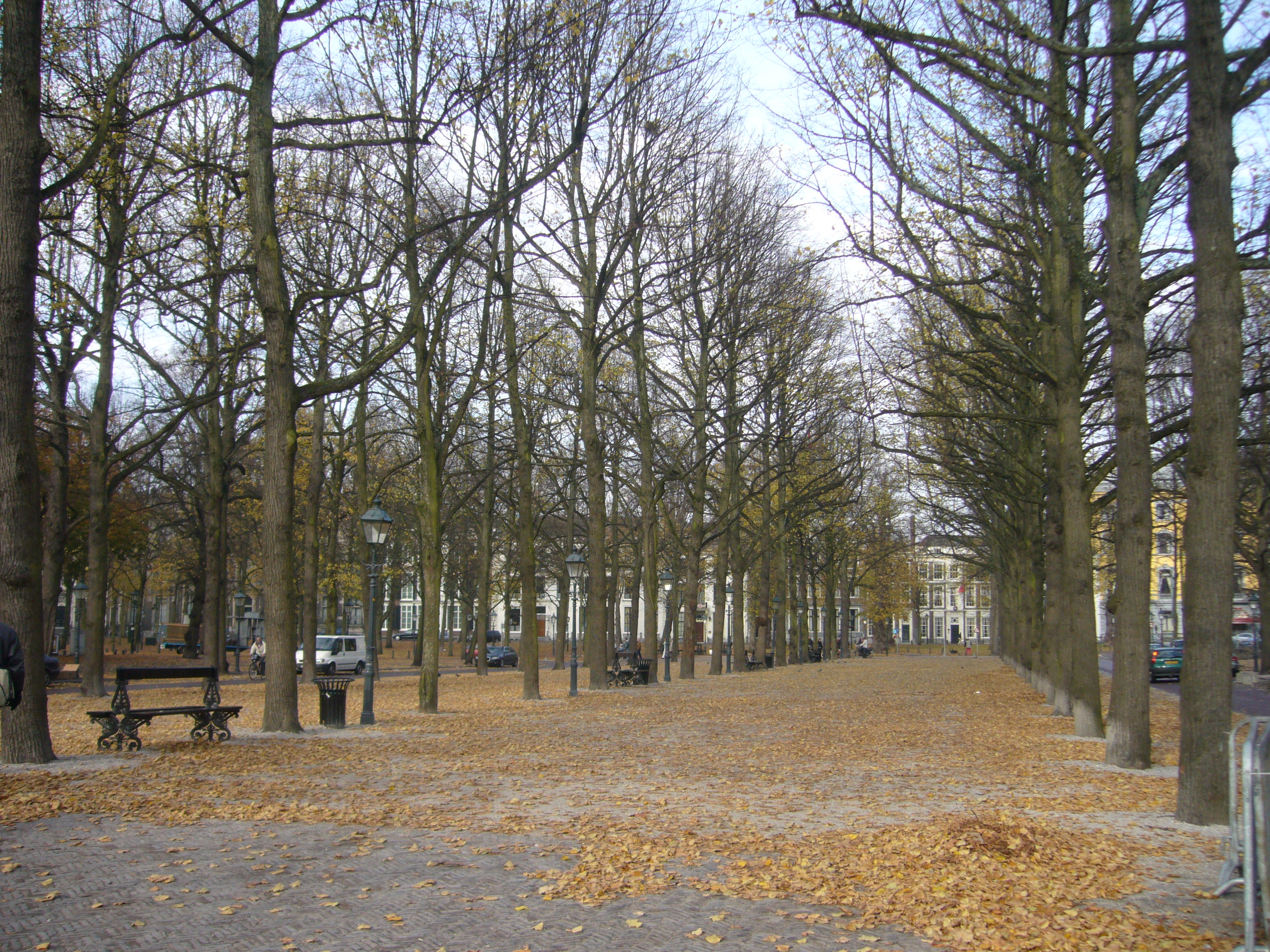 Lange Voorhout, Den Haag, na de renovatie van 2009